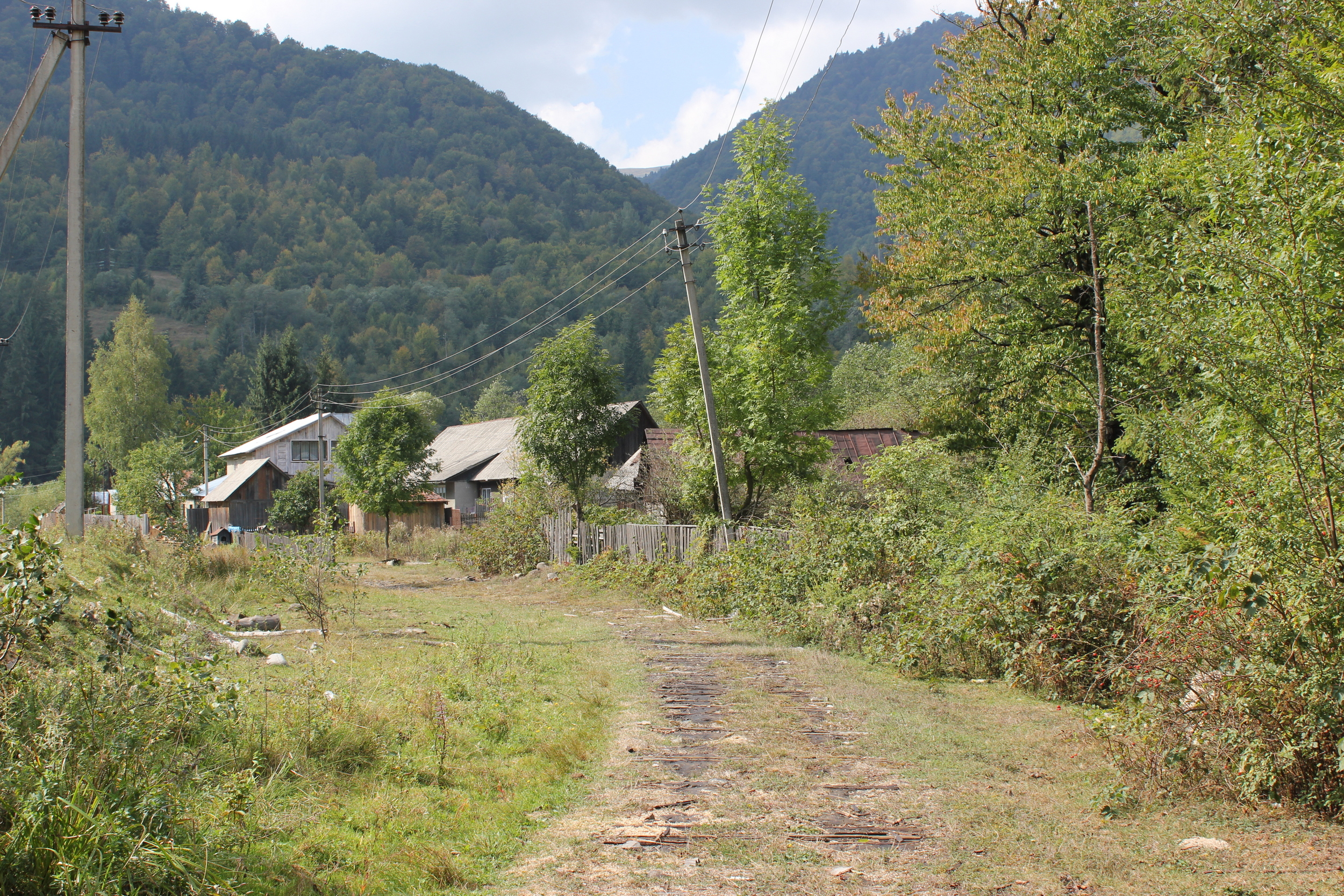 Gleisbett der ehemaligen Waldbahn Tereswatal in Ust-Tschorna, Transkarpatien, Ukraine.